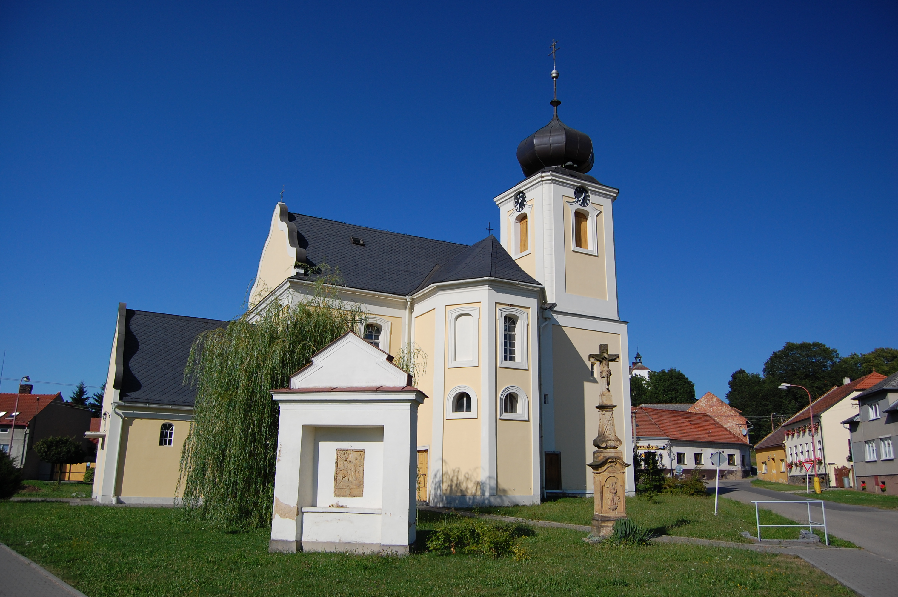 Kostel Všech svatých, Jaroměřice, okres Svitavy